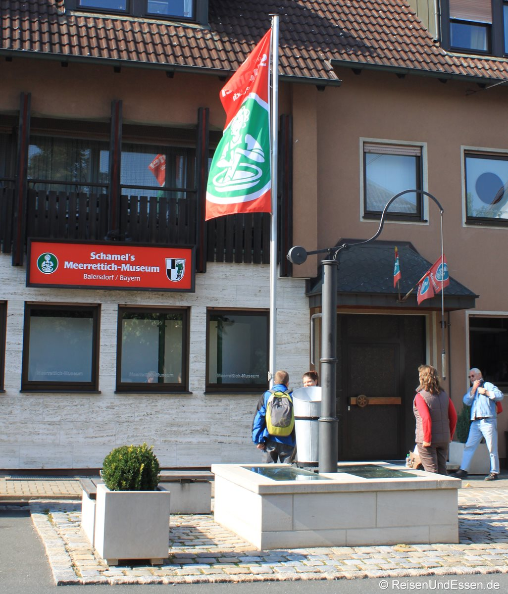 Eingang zum Meerrettich-Museum in Baiersdorf